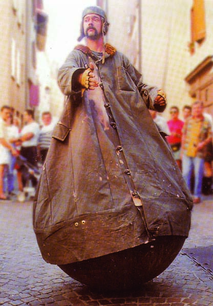 M. Culbuto ; Cie Dynamogène